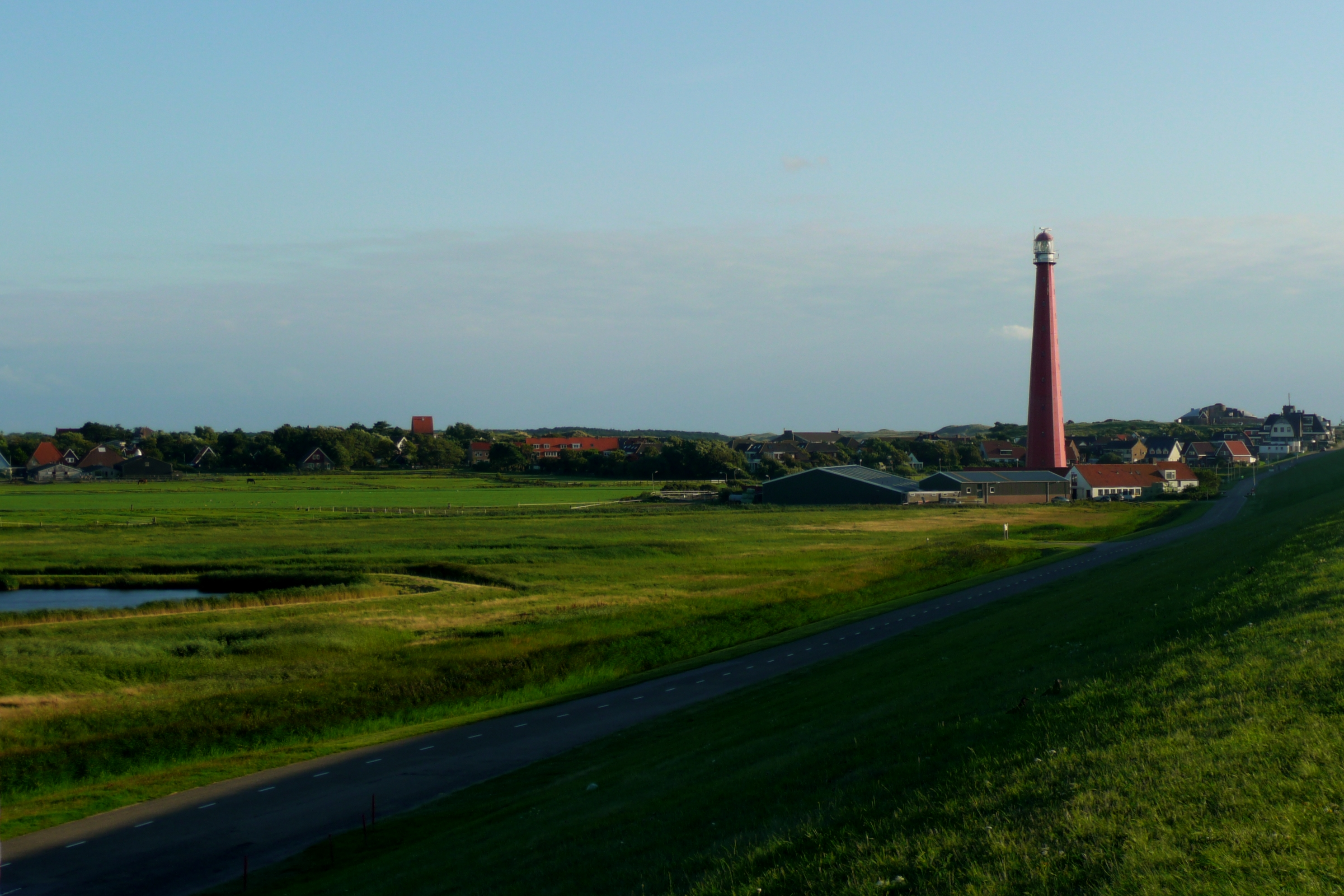 Uitzicht op Huisduinen vanaf de zeedijk.